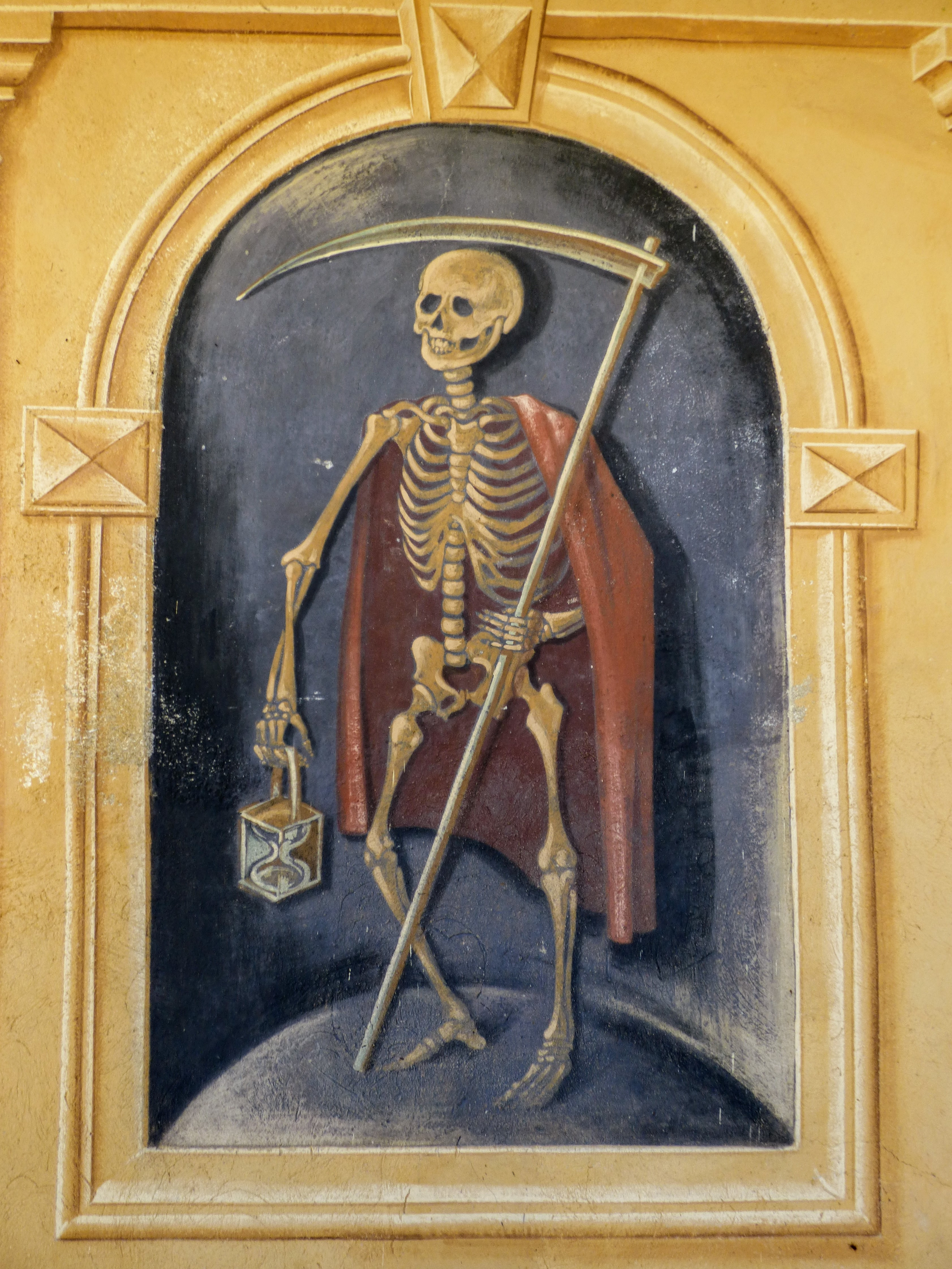 Gemälde an der Friedhofskapelle Gurnitz: Sensenmann